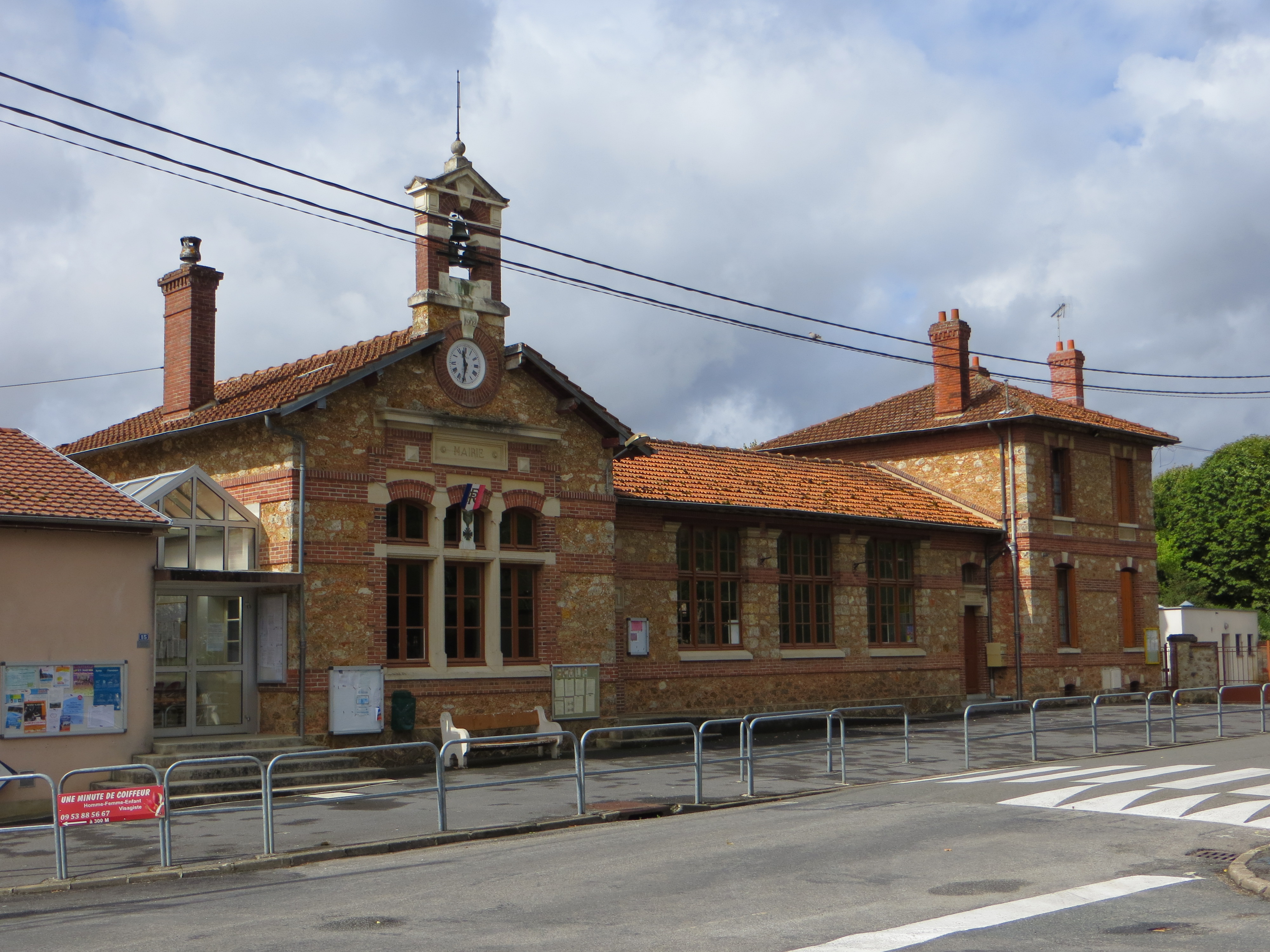 Mairie